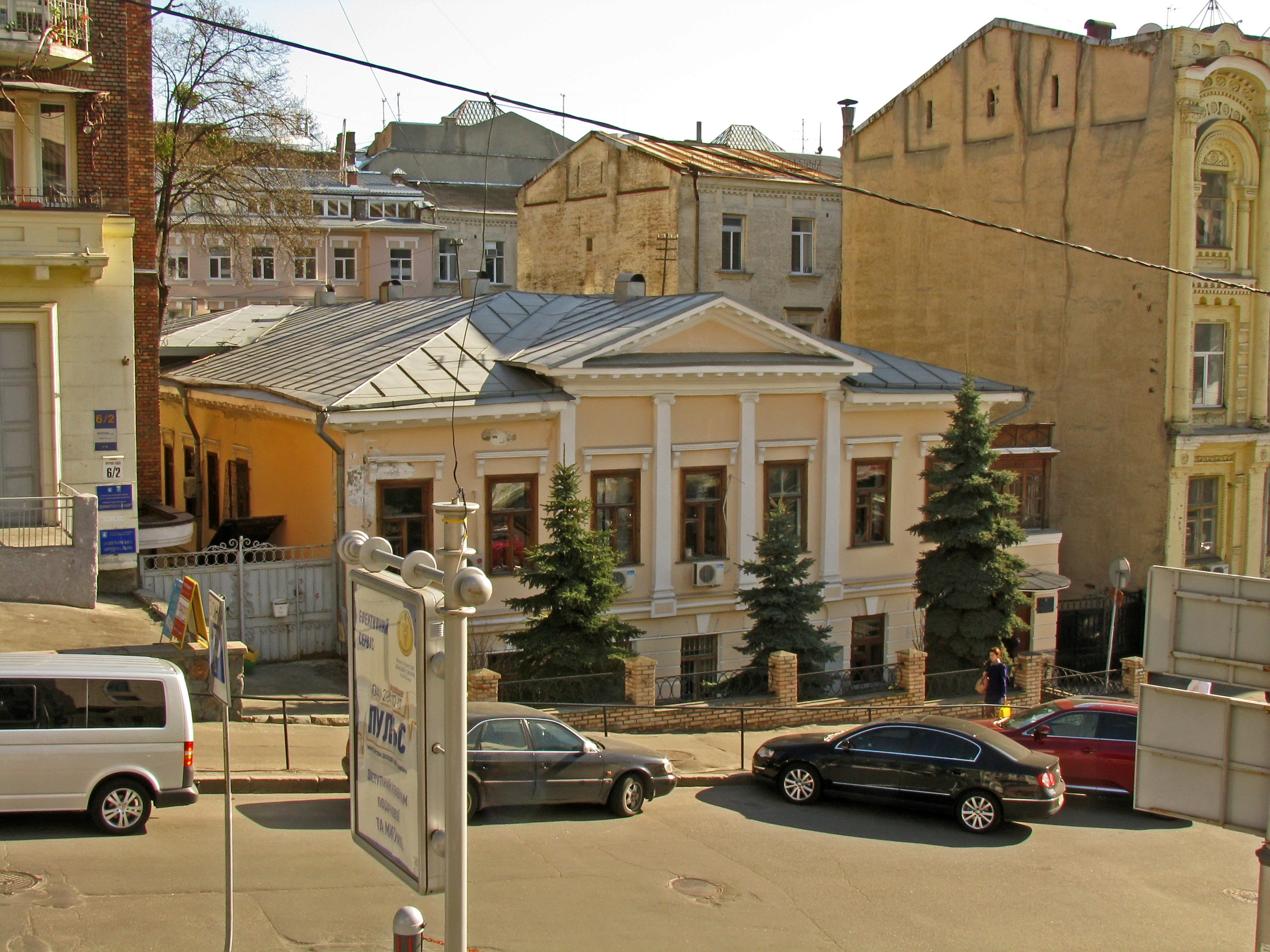 Крутий узвіз, 4 Будинок житловий